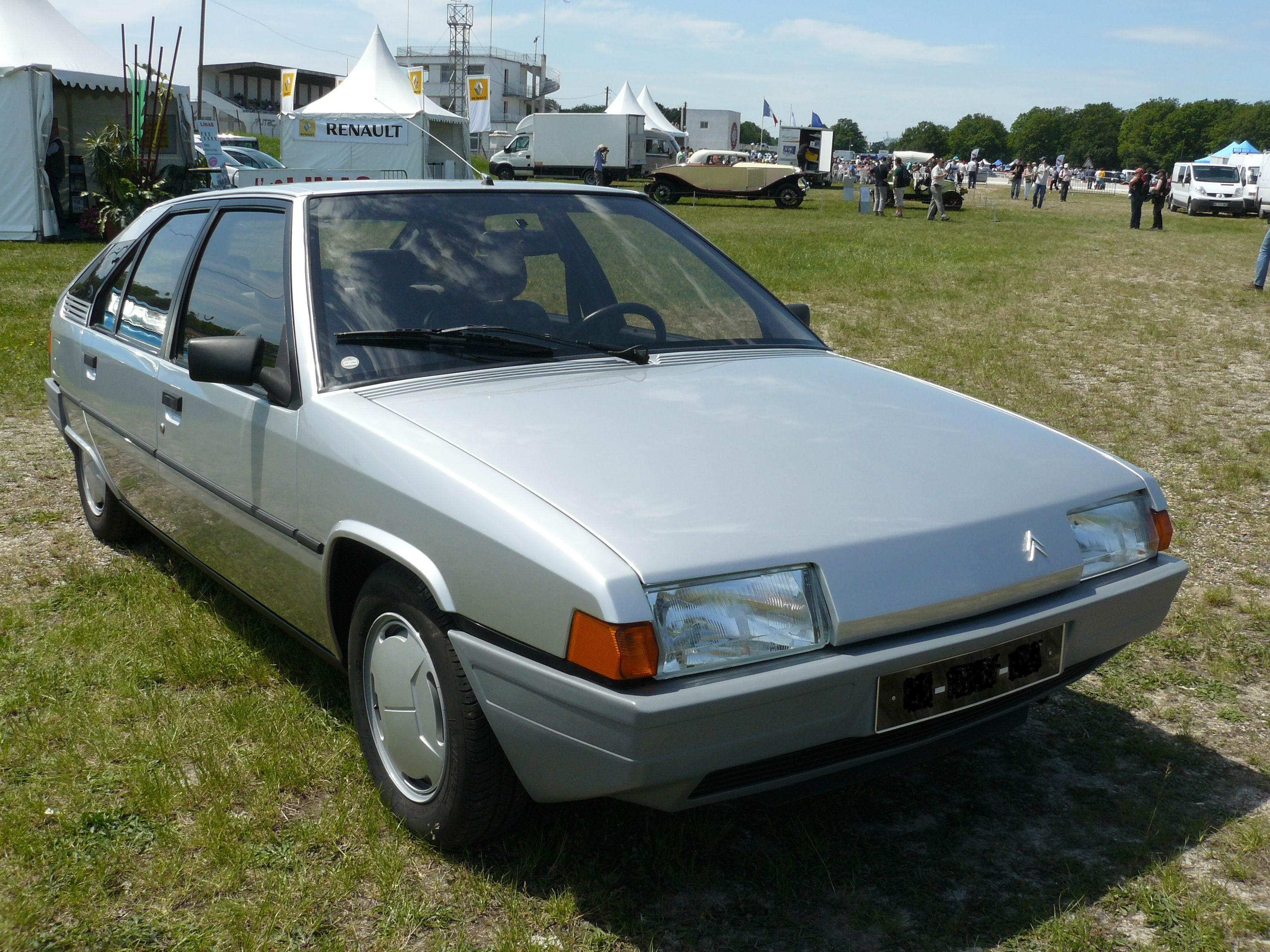 Montlhery 2012